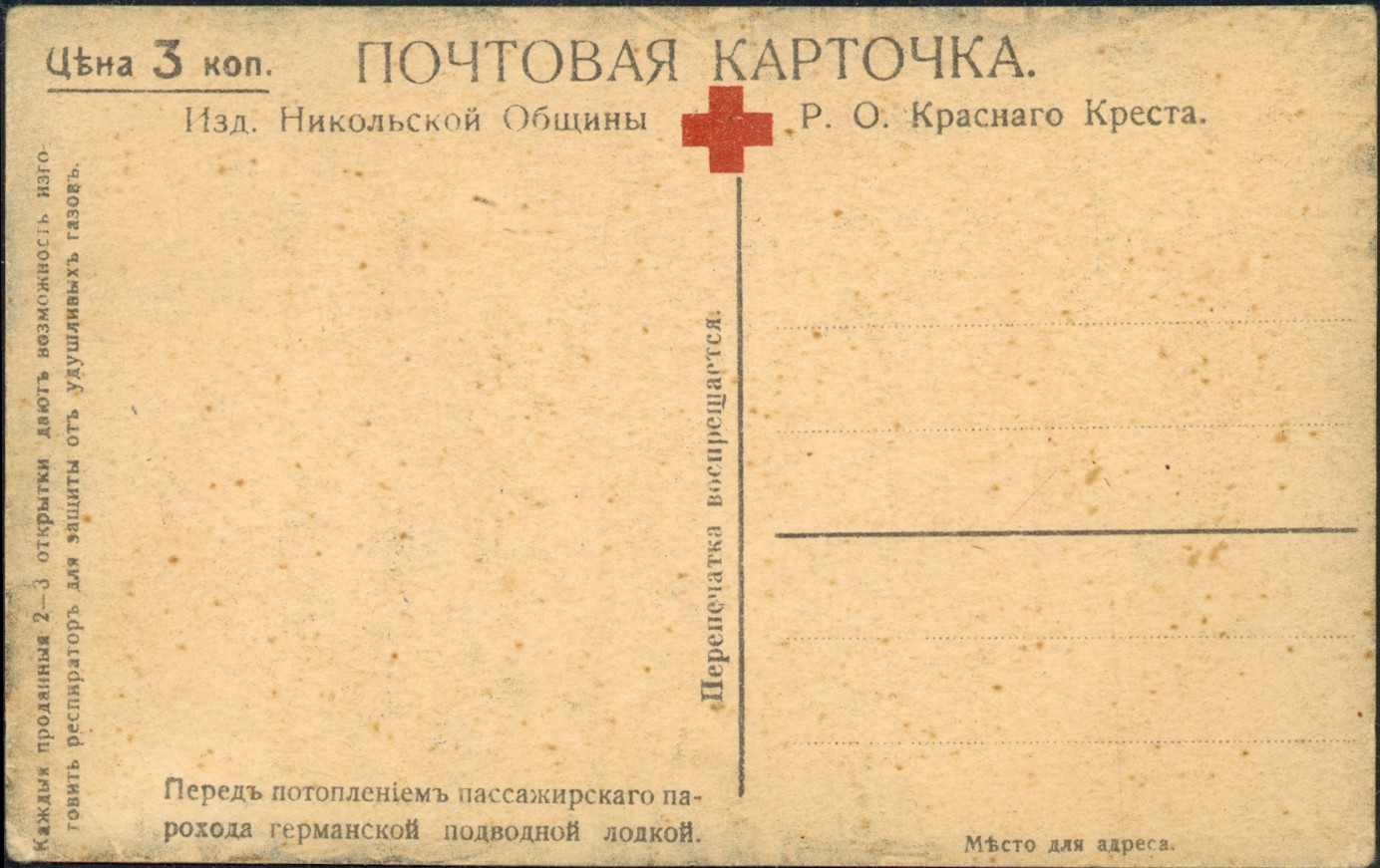 Оборотная сторона почтовой открытки "Перед потоплением пассажирского парохода германской подводной лодкой", изданной Никольской общиной Российского общества Красного Креста.